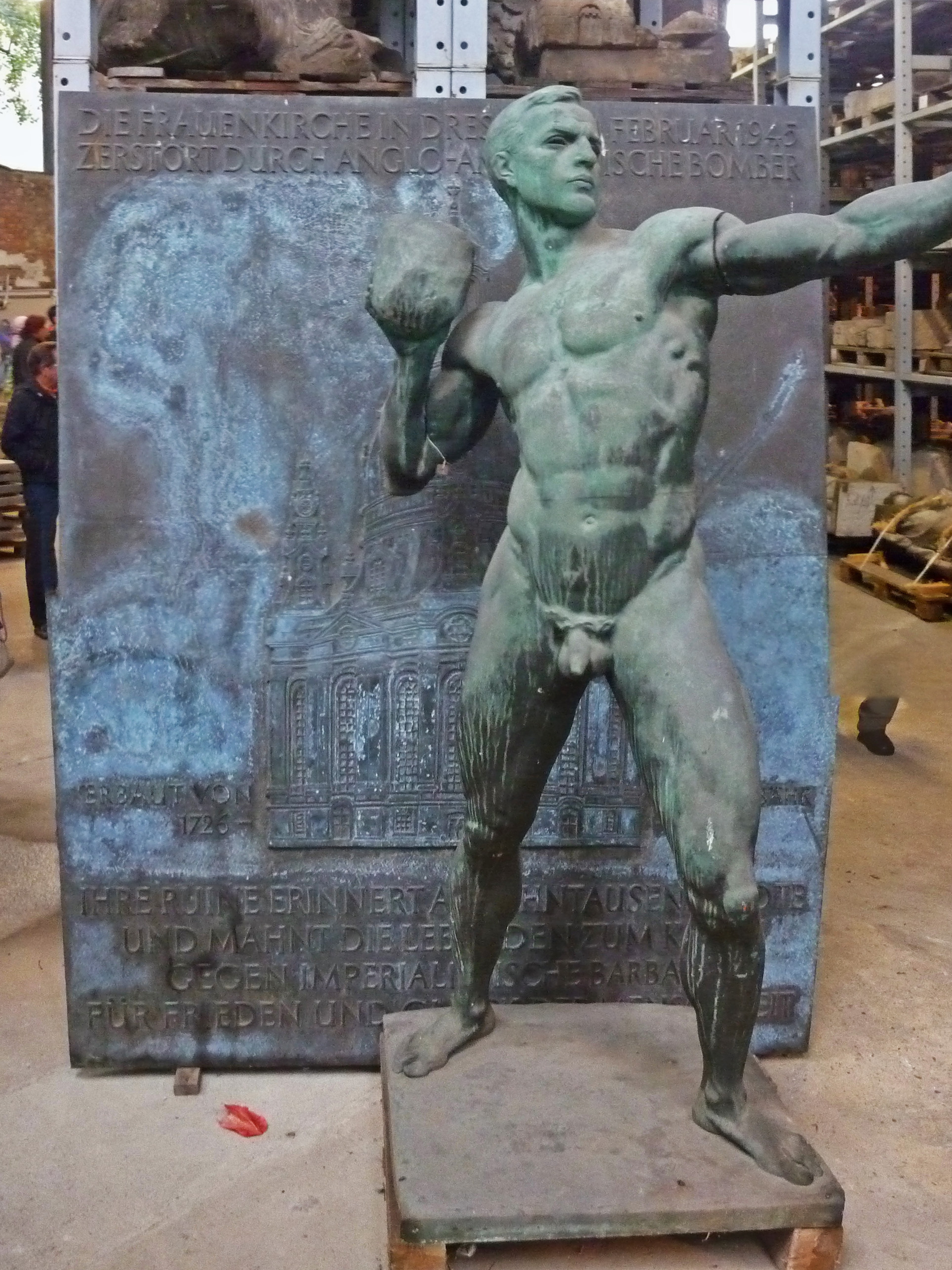 Lapidarium in der Alten Zionskirche in Dresden-Südvorstadt (aufgenommen am Tag des offenen Denkmals 2014): Plastik Steinwerfer von Richard König (1863-1937) vor alter Gedenkplatte Frauenkirche